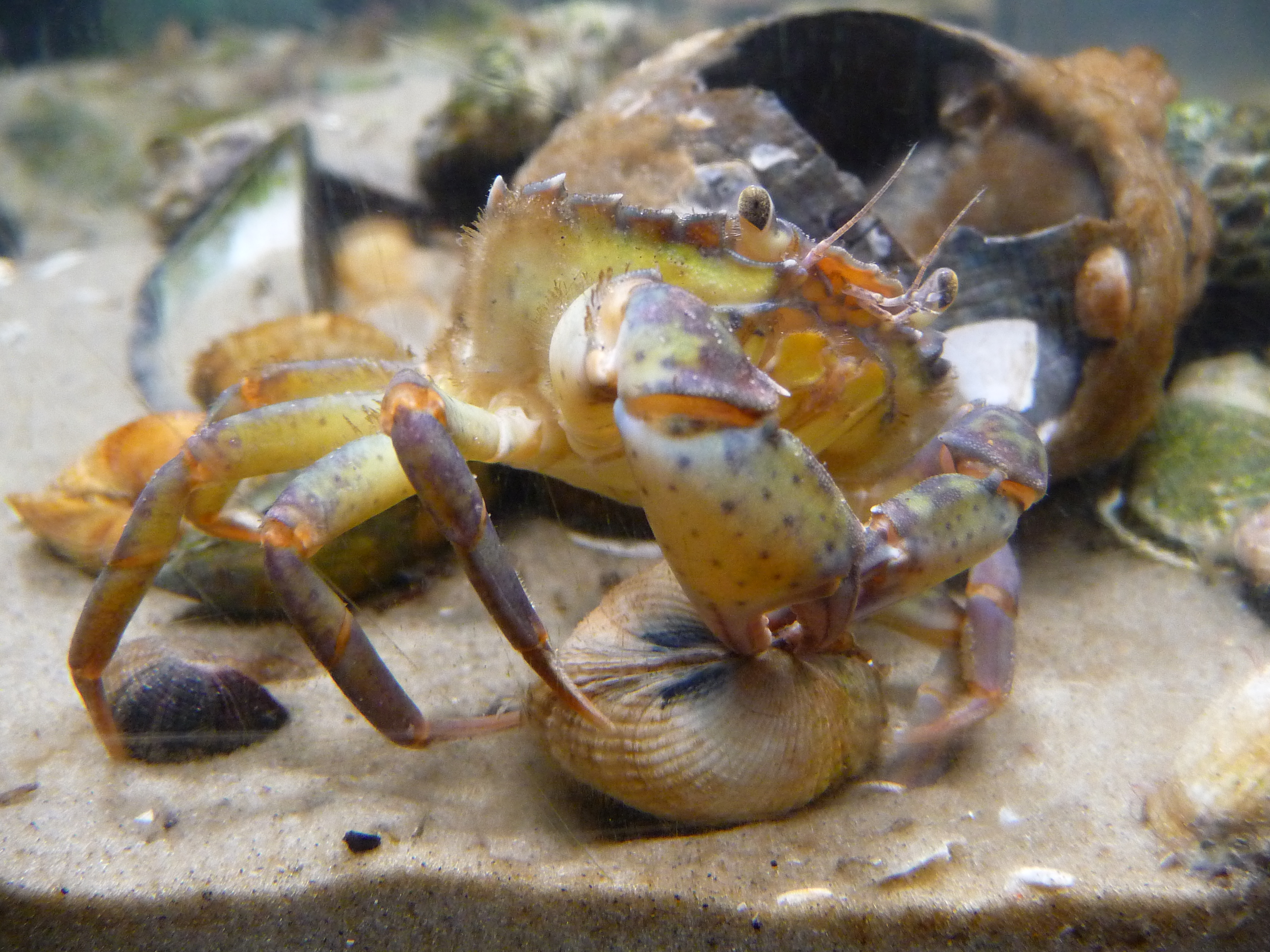 Gemeine Strandkrabbe (Carcinus maenas) beim Öffnen einer Herzmuschel (Cardiidae)